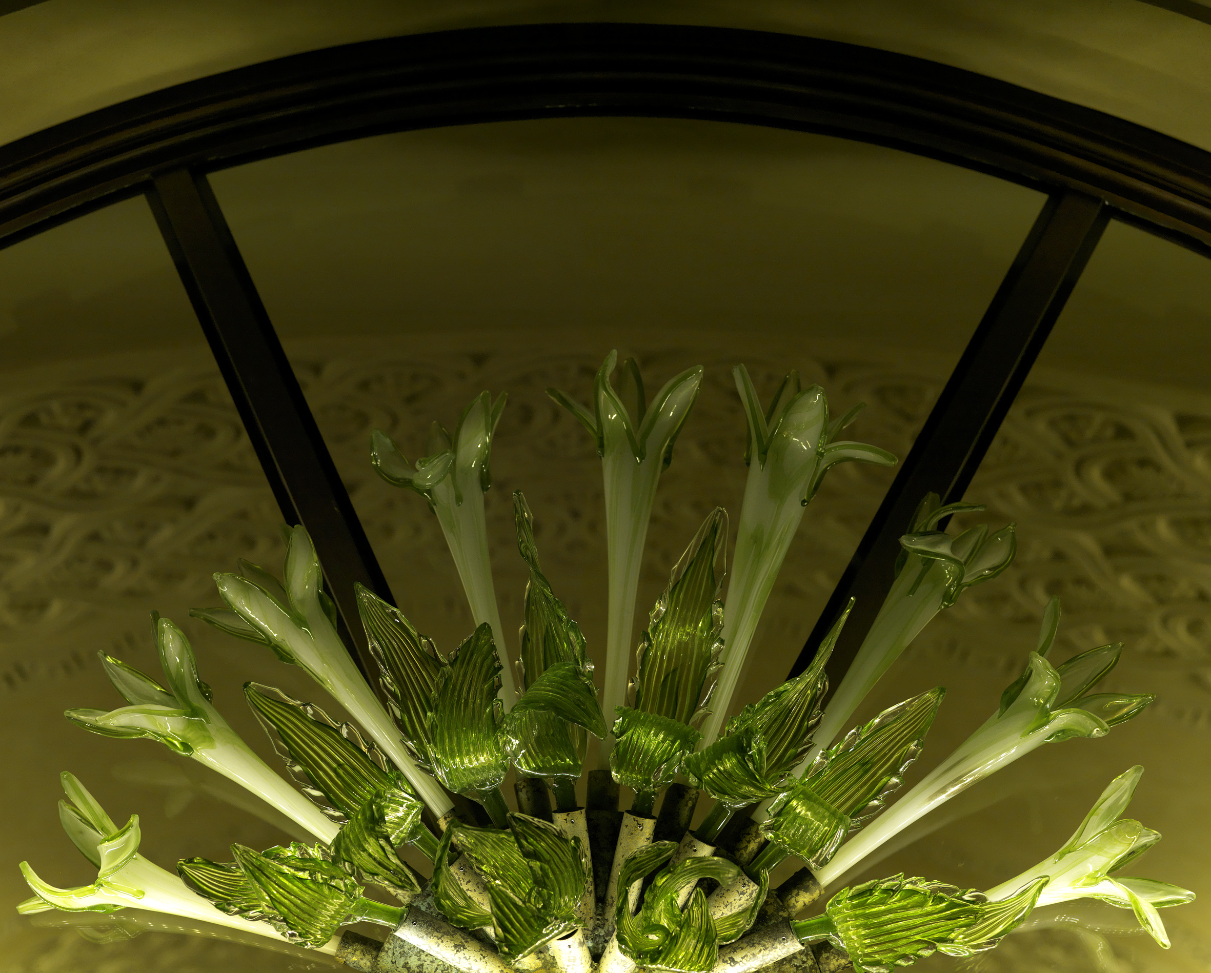 Nadbránie - detail zelených kvetov ľalií z dielne majstra Bořka Šípka